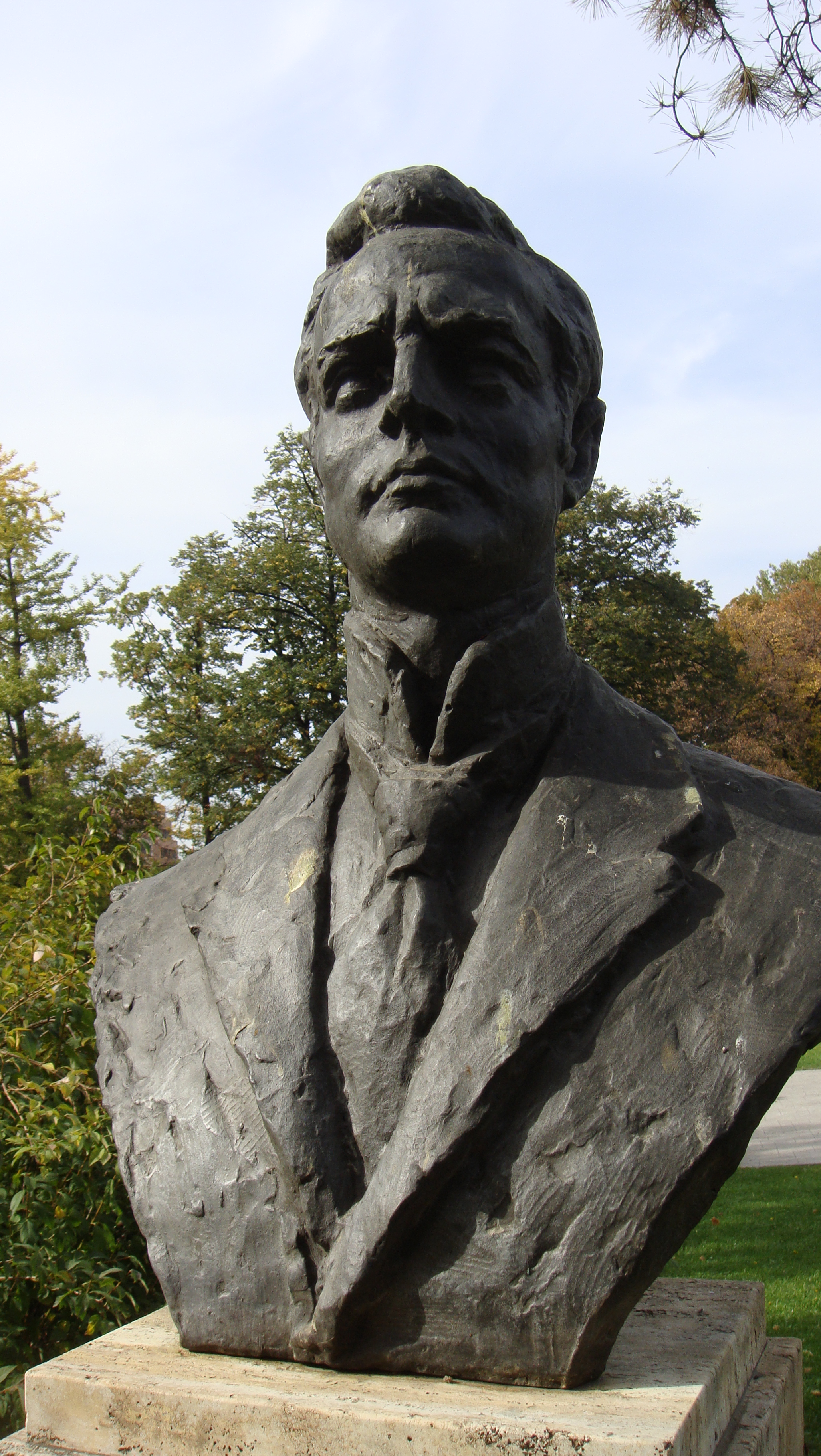 Srpskohrvatski / српскохрватски: Bista Radovana Dragovića u parku Manjež, Beograd.